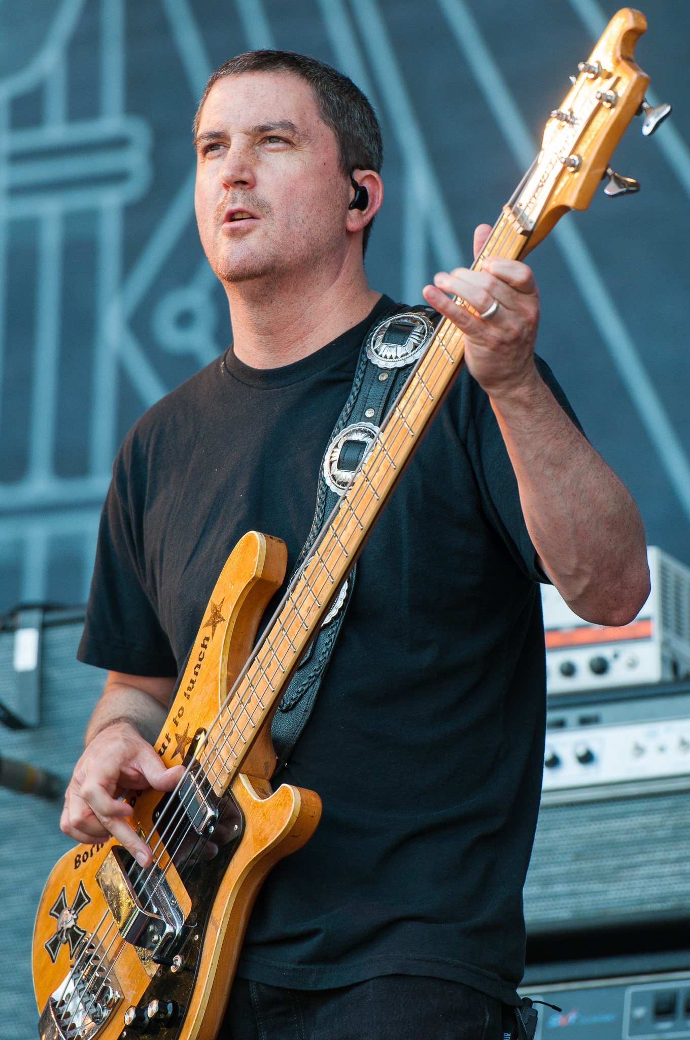 ARGO-Konzerte,Beck's Park Stage,Clutch,Dan Maines,Festival,Konzert,Livekonzert,Livemusik,Musik,RiP,Rock im Park 2015